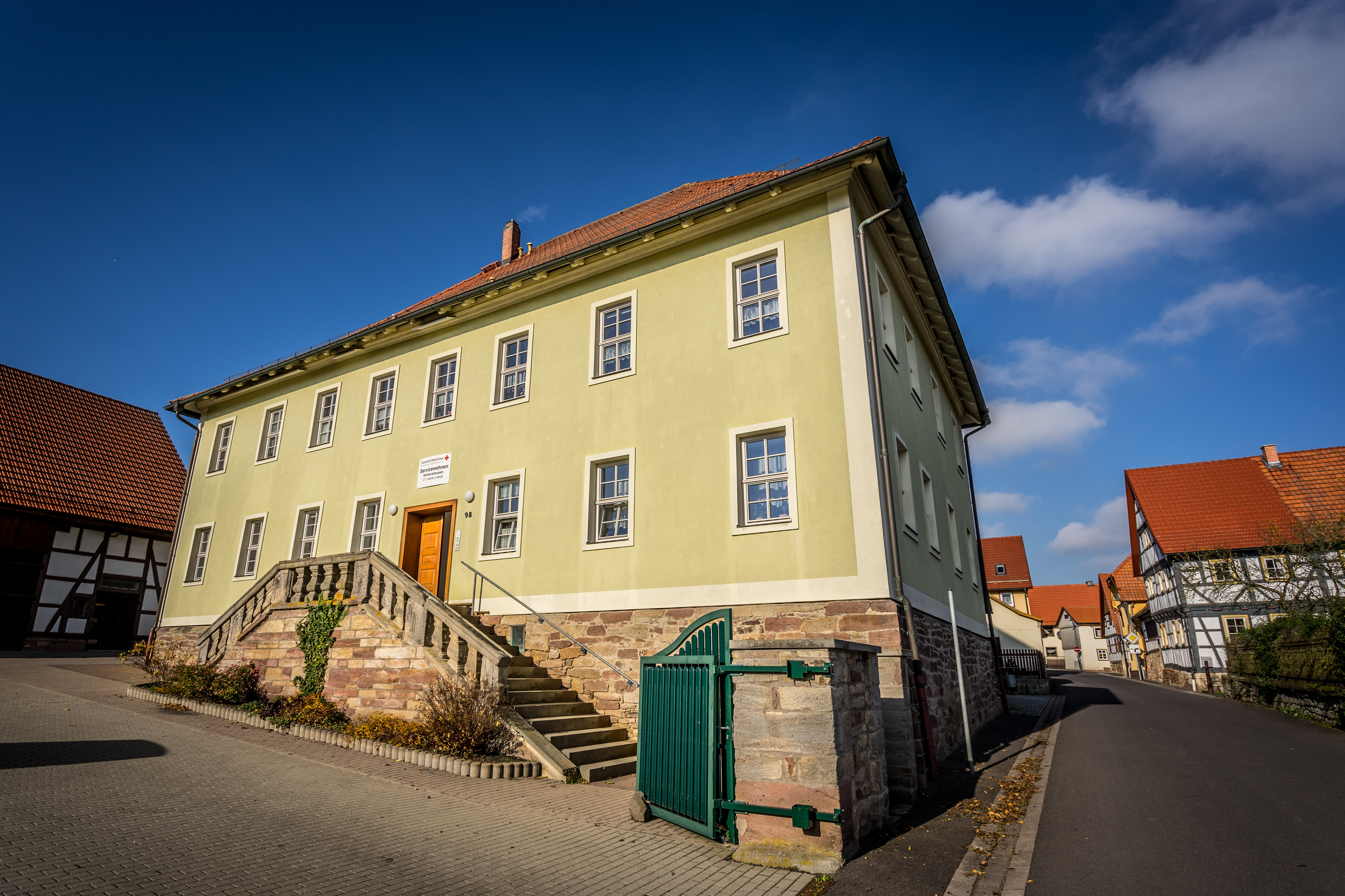 Foto des sanierten "Schwarzen Schloss" im November 2017